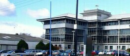 Tyndrum Street